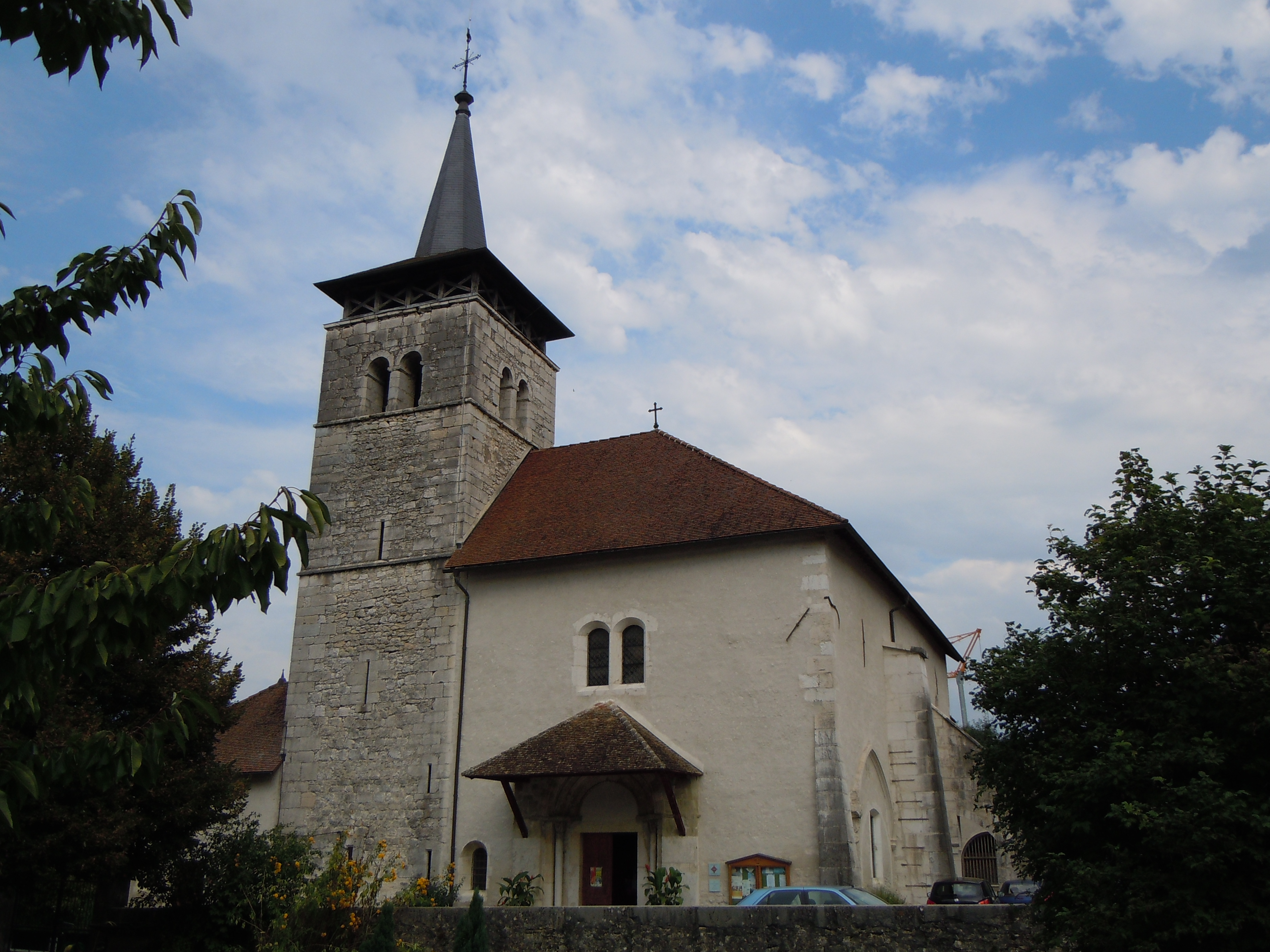 Yenne - Eglise Romane - Savoie - France